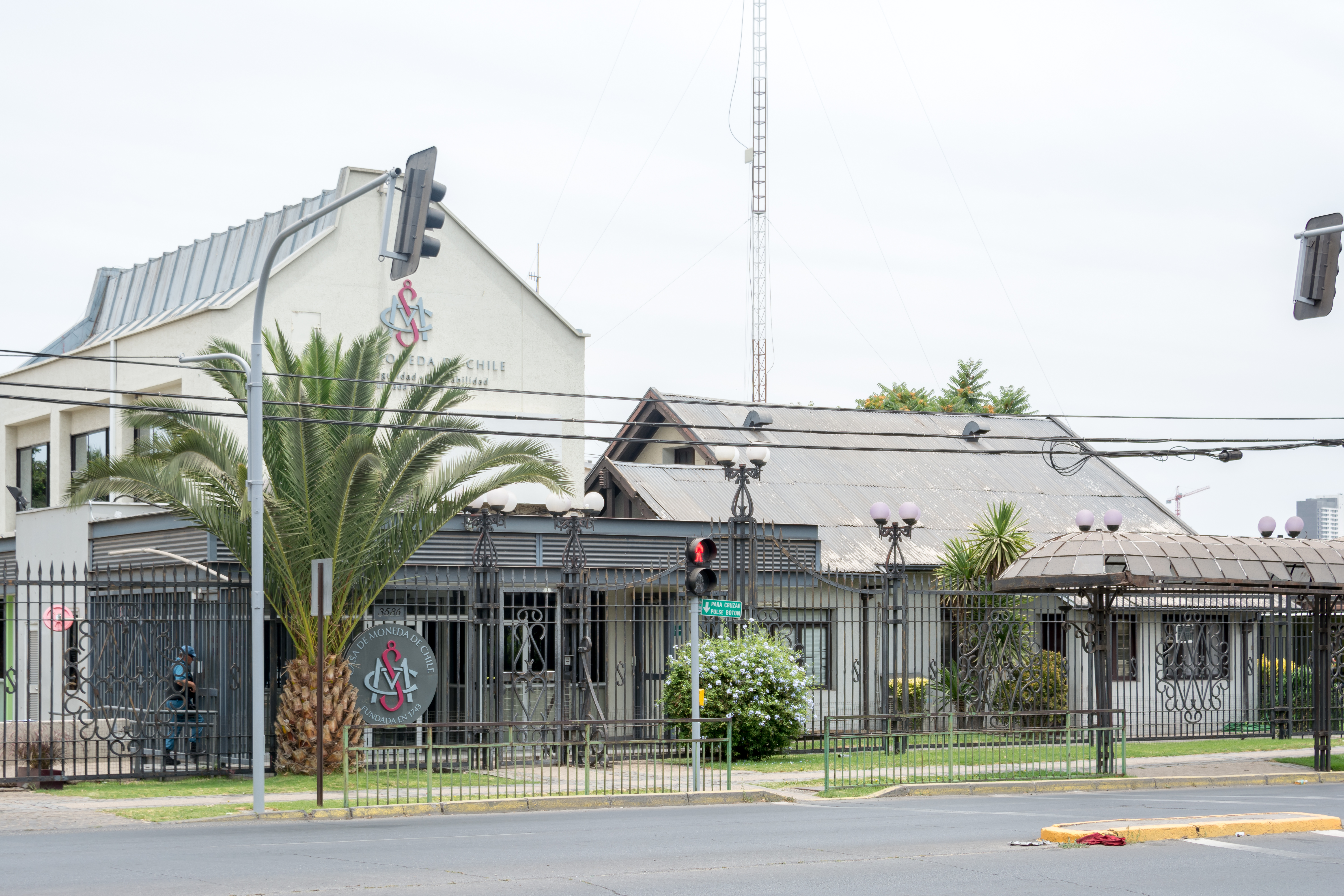 Casa de Moneda, Santiago, Región Metropolitana, Chile